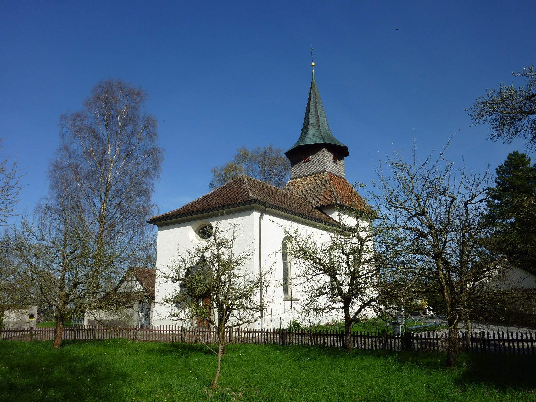 Schloss Kyburg Kirche Kyburg Dorf